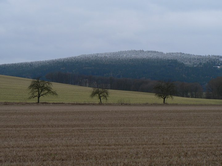 Vrchol Bradla u Dolní Libiny, březen 2011.